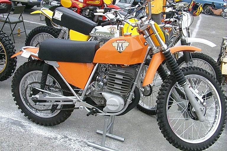 Maico MX motorcycle 1970s